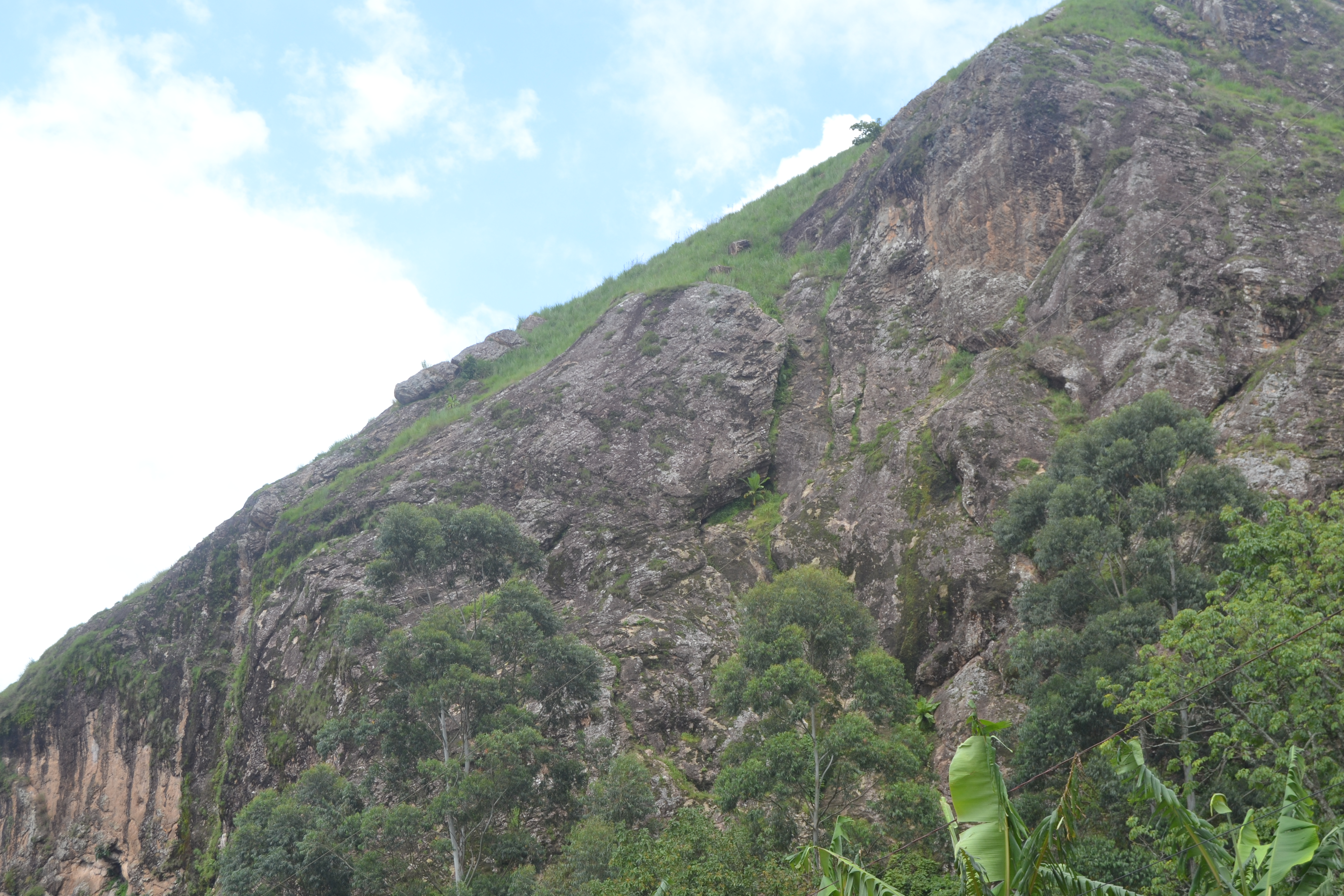 Rhumsiki est situé dans la chaîne des Monts Mandara à 55 km de Mokolo.